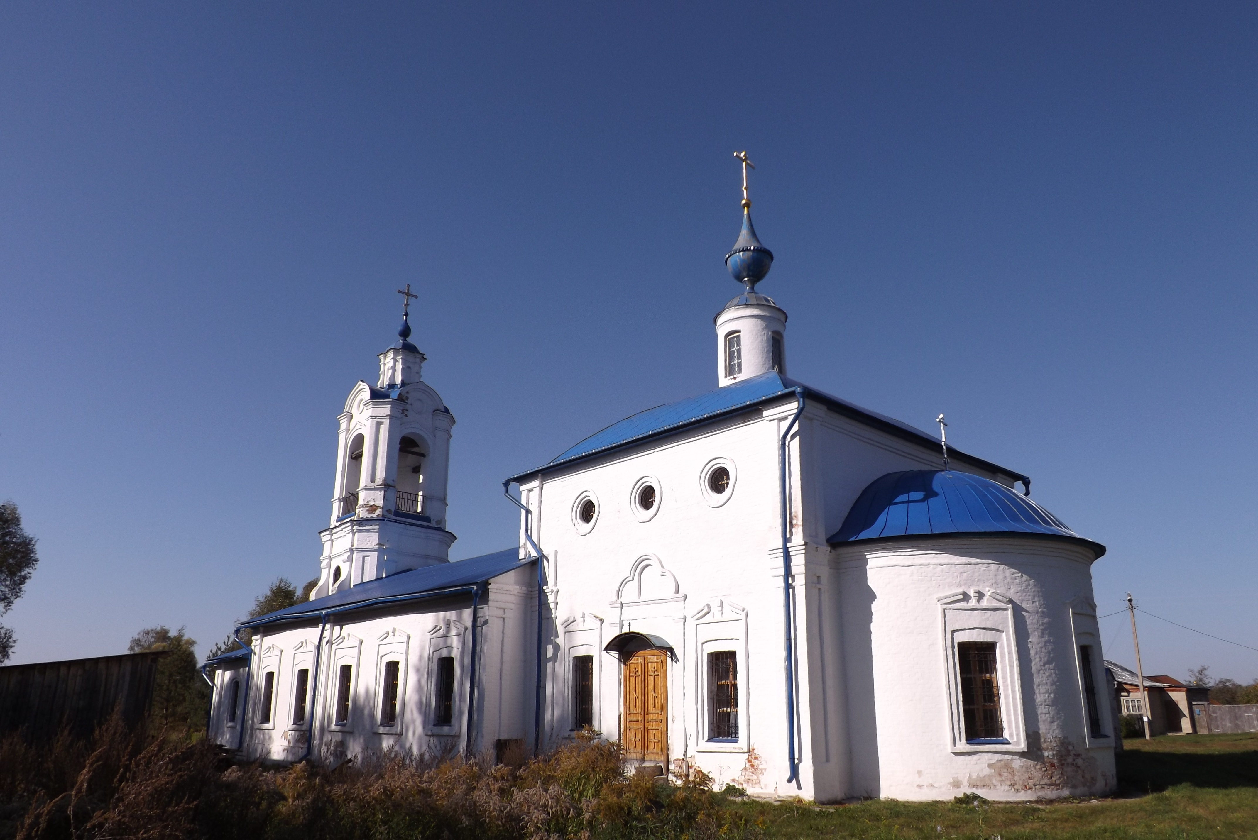 Церковь Рождества Богородицы с колокольней: Баскаки, Суздальский район, Владимирская область